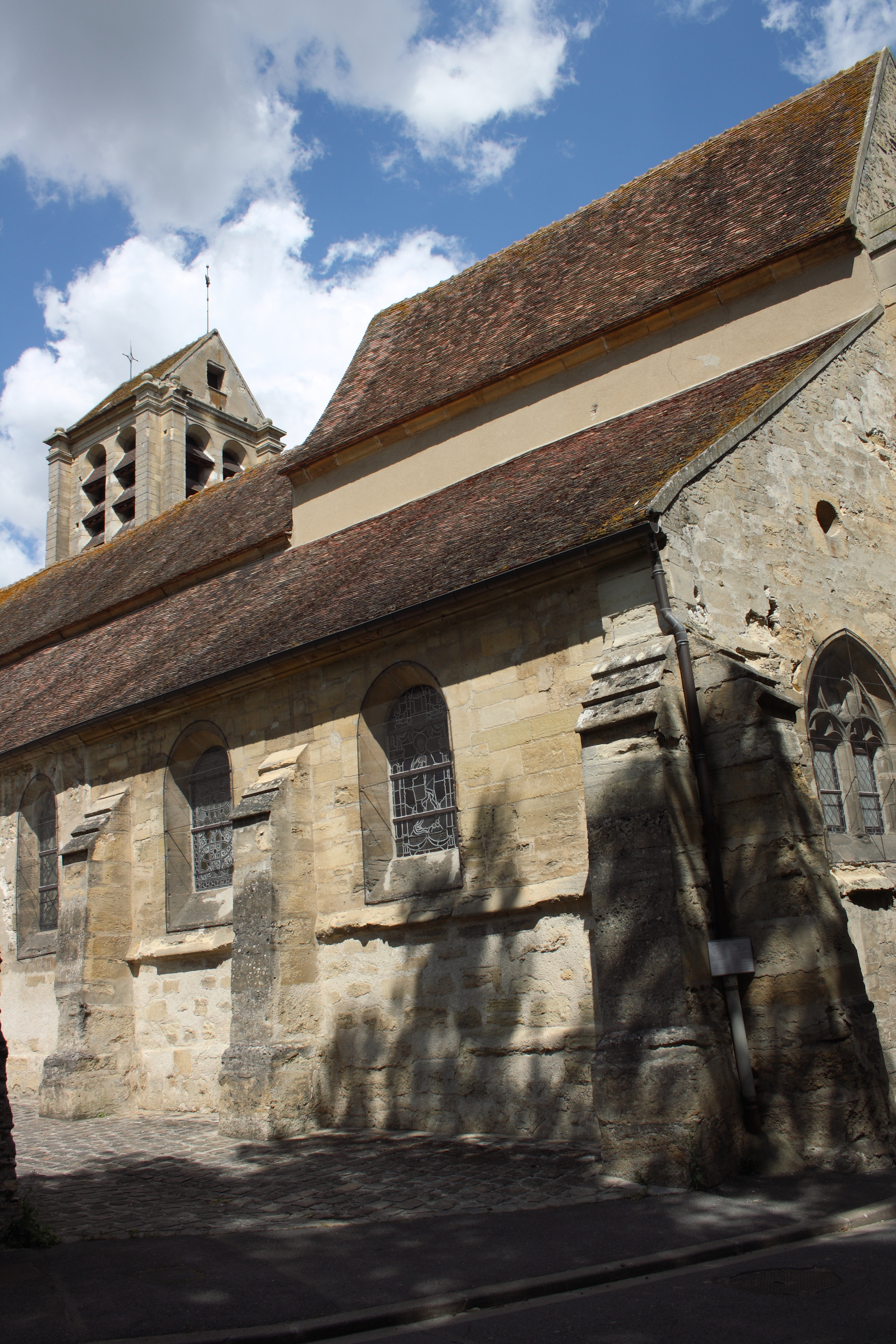 katholische Kirche Notre-Dame-de-l'Assomption in Vauréal